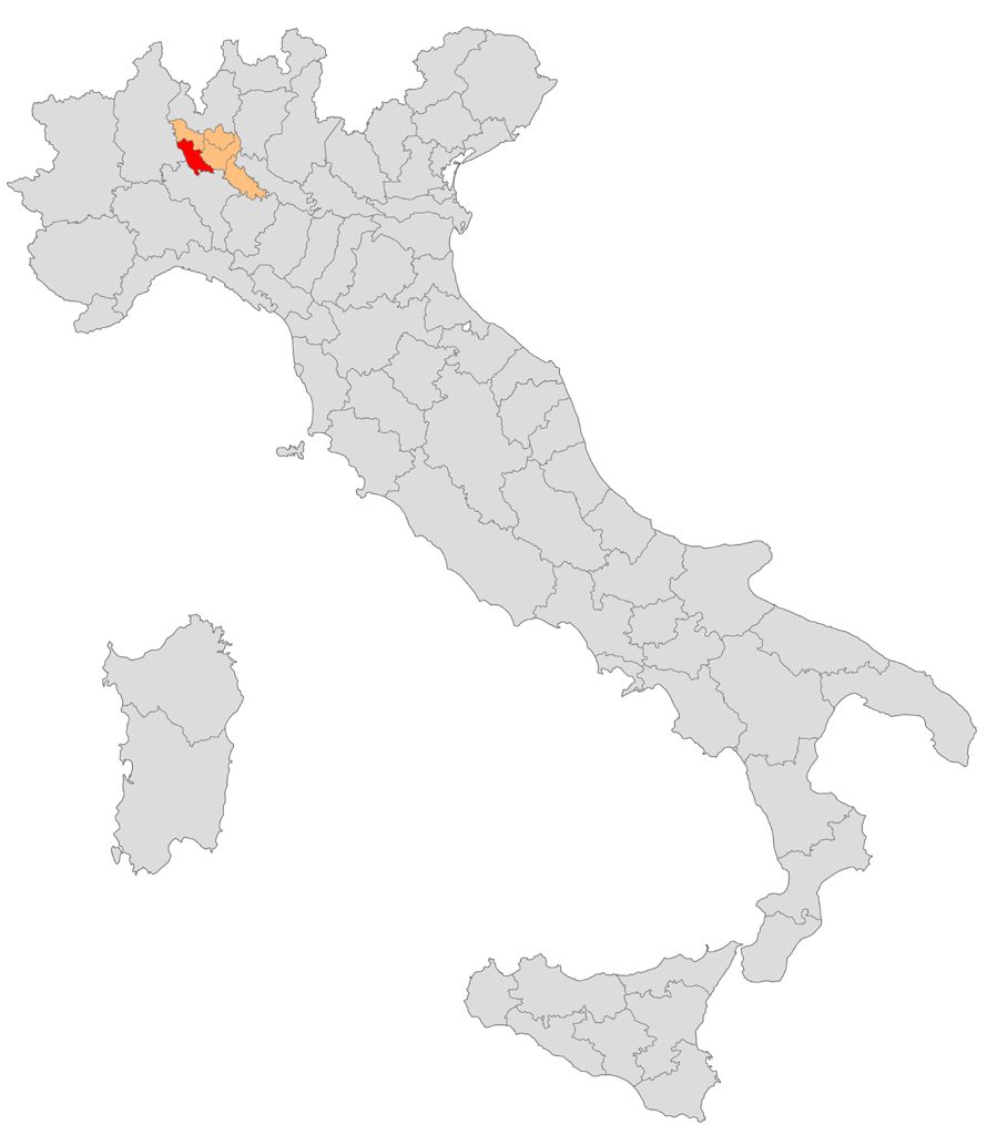 Mappa del circondario di Abbiategrasso nella provincia di Milano (1859-1926)